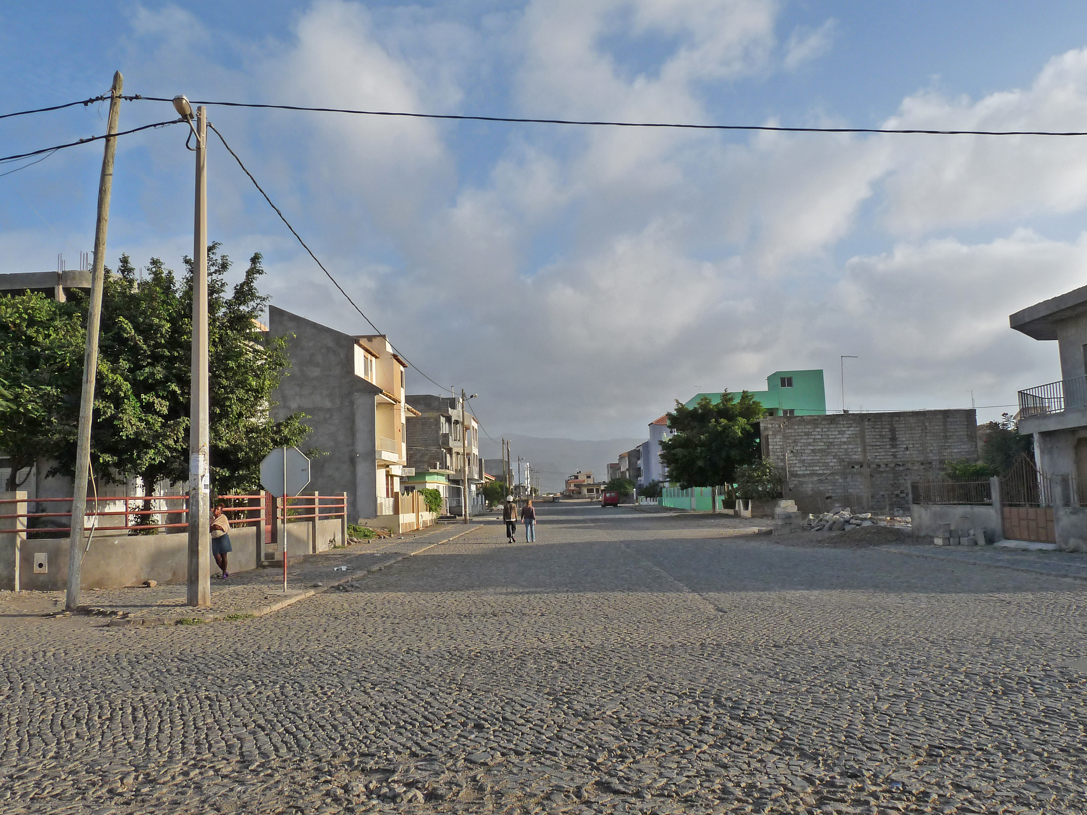 Tarrafal (île de Santiago, Cap-Vert) : large avenue pavée (basalte)